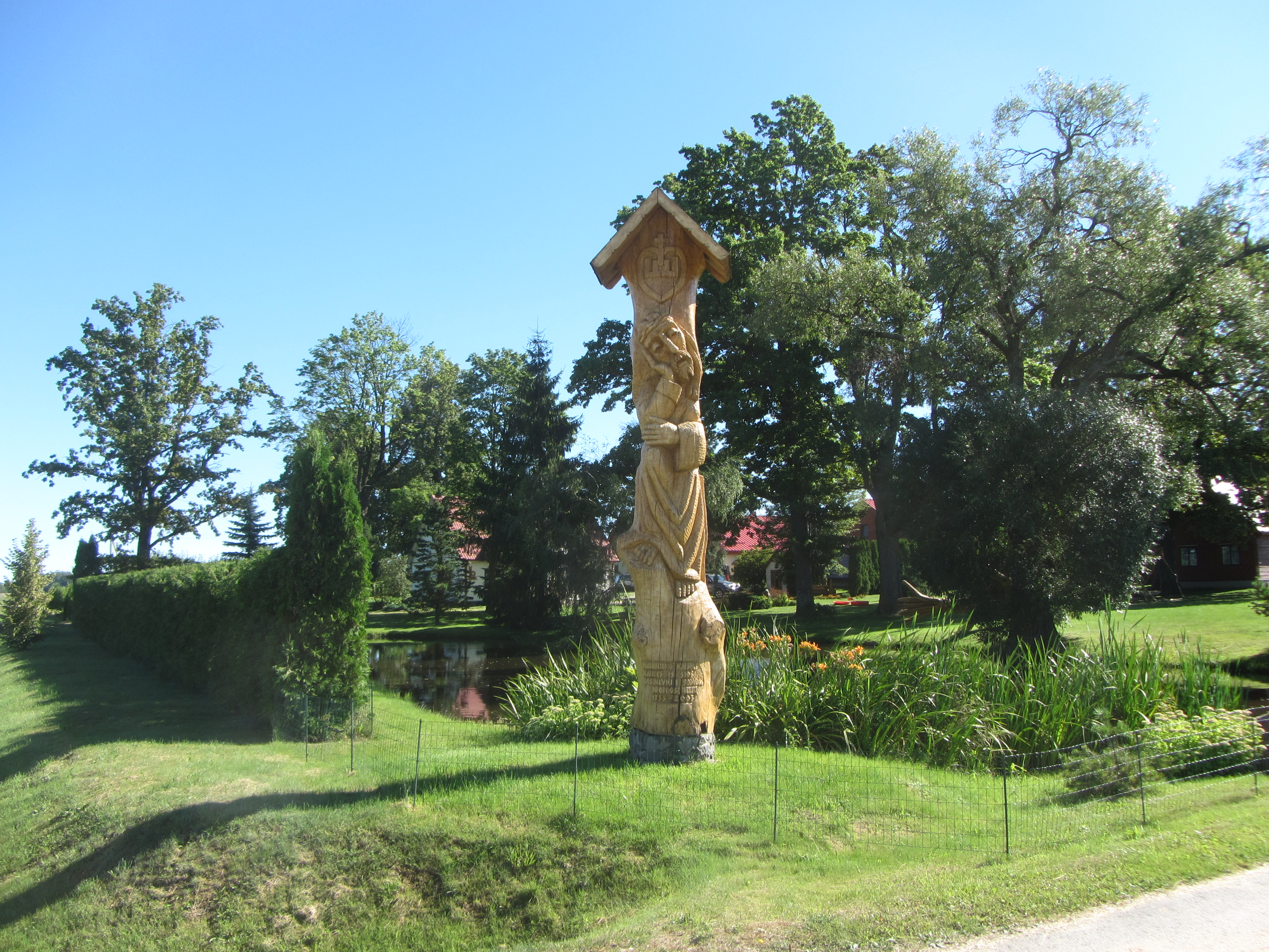 Rokiškio kaimiškoji sen., Lithuania